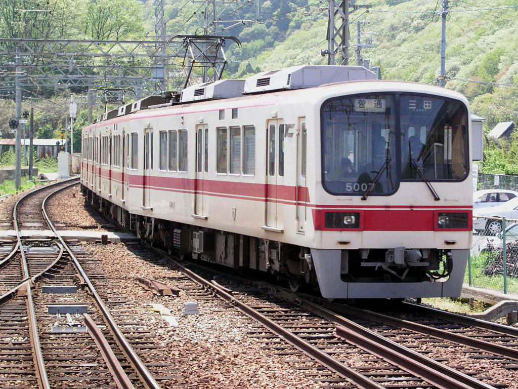 神戸電鉄5000系